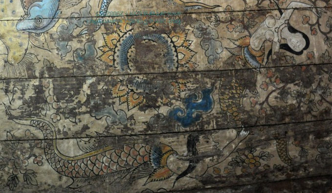 เงือกงู จิตรกรรมสีฝุ่นบนเพดานสิมโบราณ วัดนกออก(วัดปทุมคงคา) อำเภอปักธงชัย จังหวัดนครราชสีมา